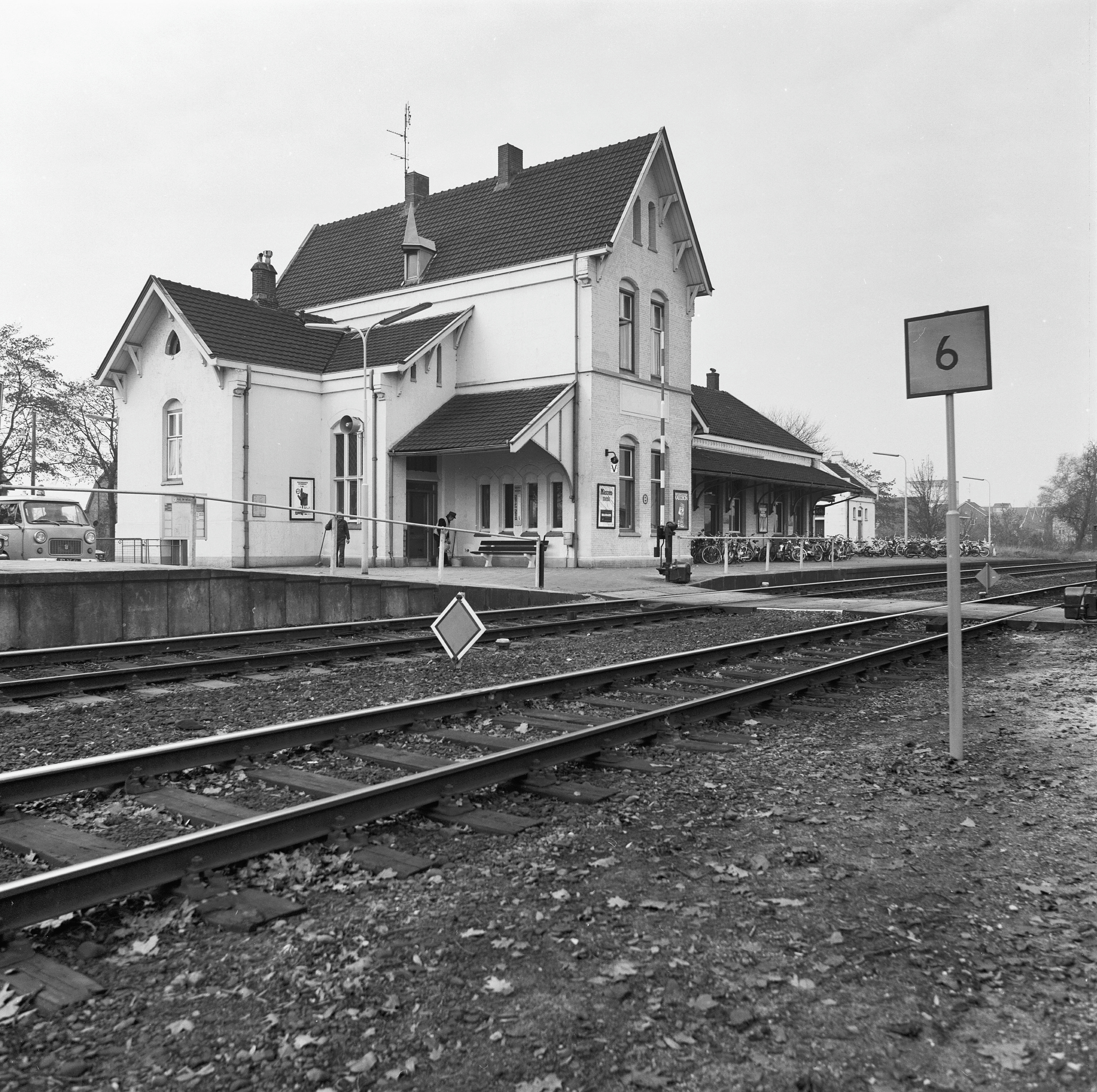 Station N.S: gevel perronzijde